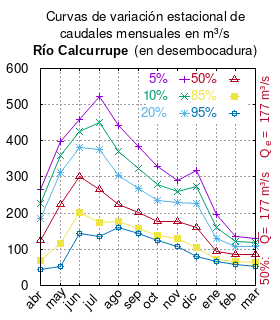 Curvas de variación estacional del río Calcurrupe en desembocadura. # Dirección General de Aguas # Diagnóstico y clasificación de los cursos y cuerpos de agua según objetivos de calidad. Cuenca del río Bueno. # Santiago de Chile # Ministerio de Obras Públicas (Chile) # 2004 # url: # urlarchivo: # Tabla 4.1: Río Calcurrupe en desembocadura (m3/s), pág. 44 mes 5% 10% 20% 50% 85% 95% abr 266.62 227.24 186.19 124.18 69.10 44.11 may 397.93 359.80 313.61 225.34 116.61 52.75 jun 459.95 424.92 382.50 301.41 201.53 142.86 jul 521.46 449.70 375.88 266.74 174.84 136.44 ago 443.08 369.90 304.06 225.00 176.16 160.84 sep 384.94 324.48 269.13 200.86 156.93 142.62 oct 330.11 280.50 234.52 176.70 138.42 125.62 nov 290.23 260.37 228.29 177.55 130.28 108.62 dic 317.16 272.89 227.48 160.59 104.59 81.31 ene 195.82 161.34 130.73 94.72 73.15 66.57 feb 135.04 121.42 107.22 85.77 66.71 58.07 mar 129.90 119.31 107.01 85.72 63.65 52.70 This plot was created with Gnuplot.